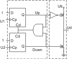 Etapas de un detector fase frecuencia típico para un PLL